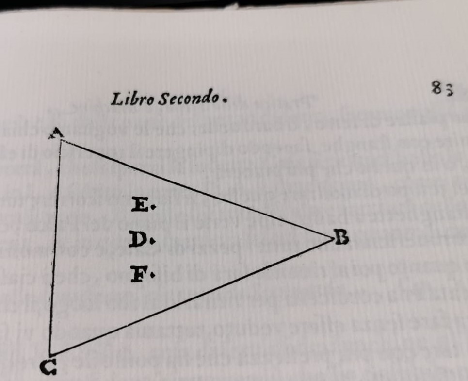 Hier sieht man eine Skizze von einem Periaktoi von Nicola Sabbatini.